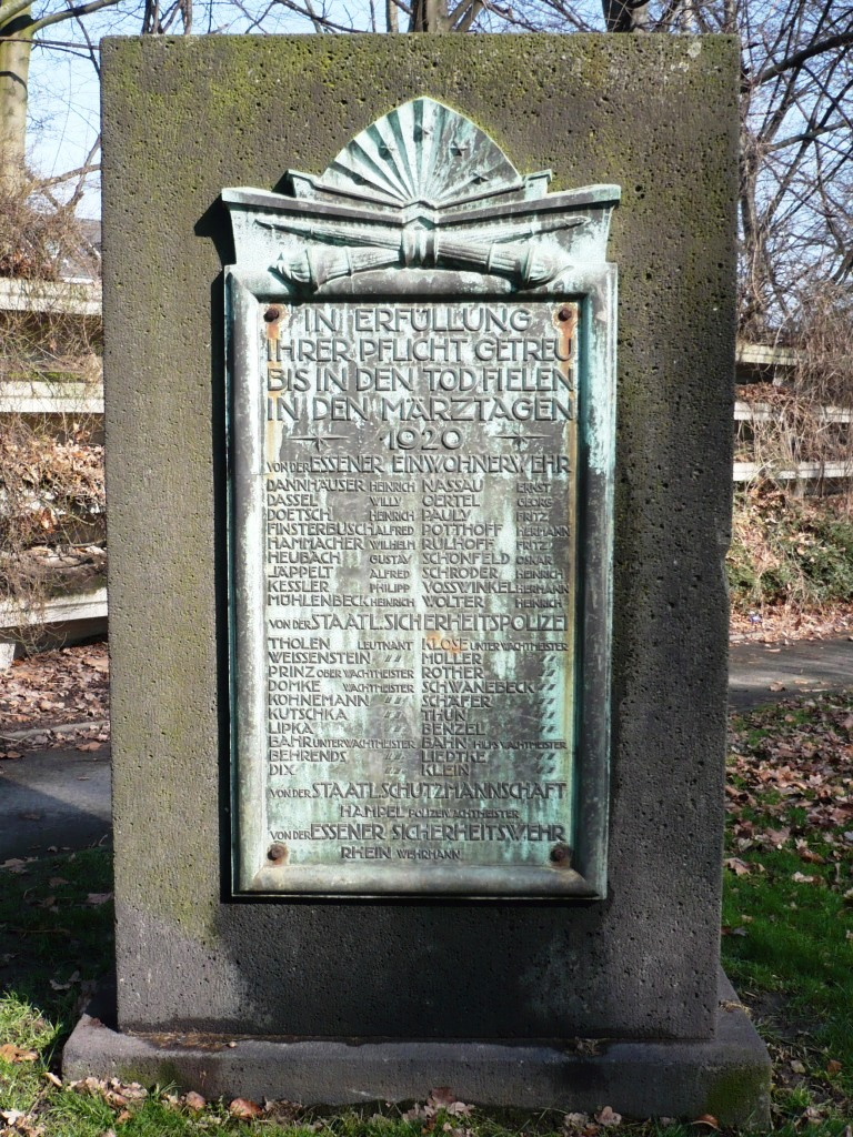 Gedenkstein am Wasserturm am Steeler Berg in Essen-Huttrop